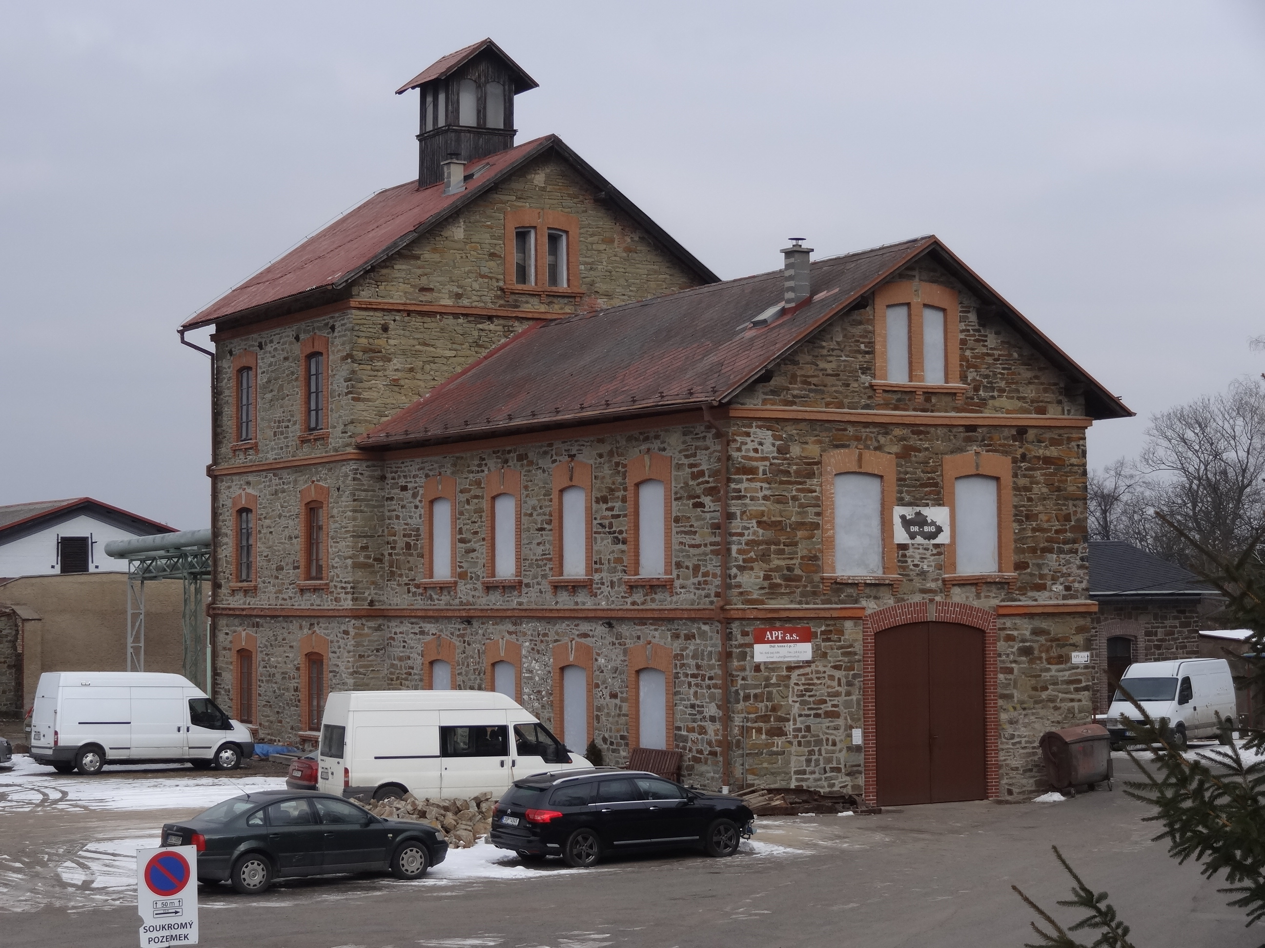 Důl Anna, čp. 27, 274, Březové Hory, Příbram.